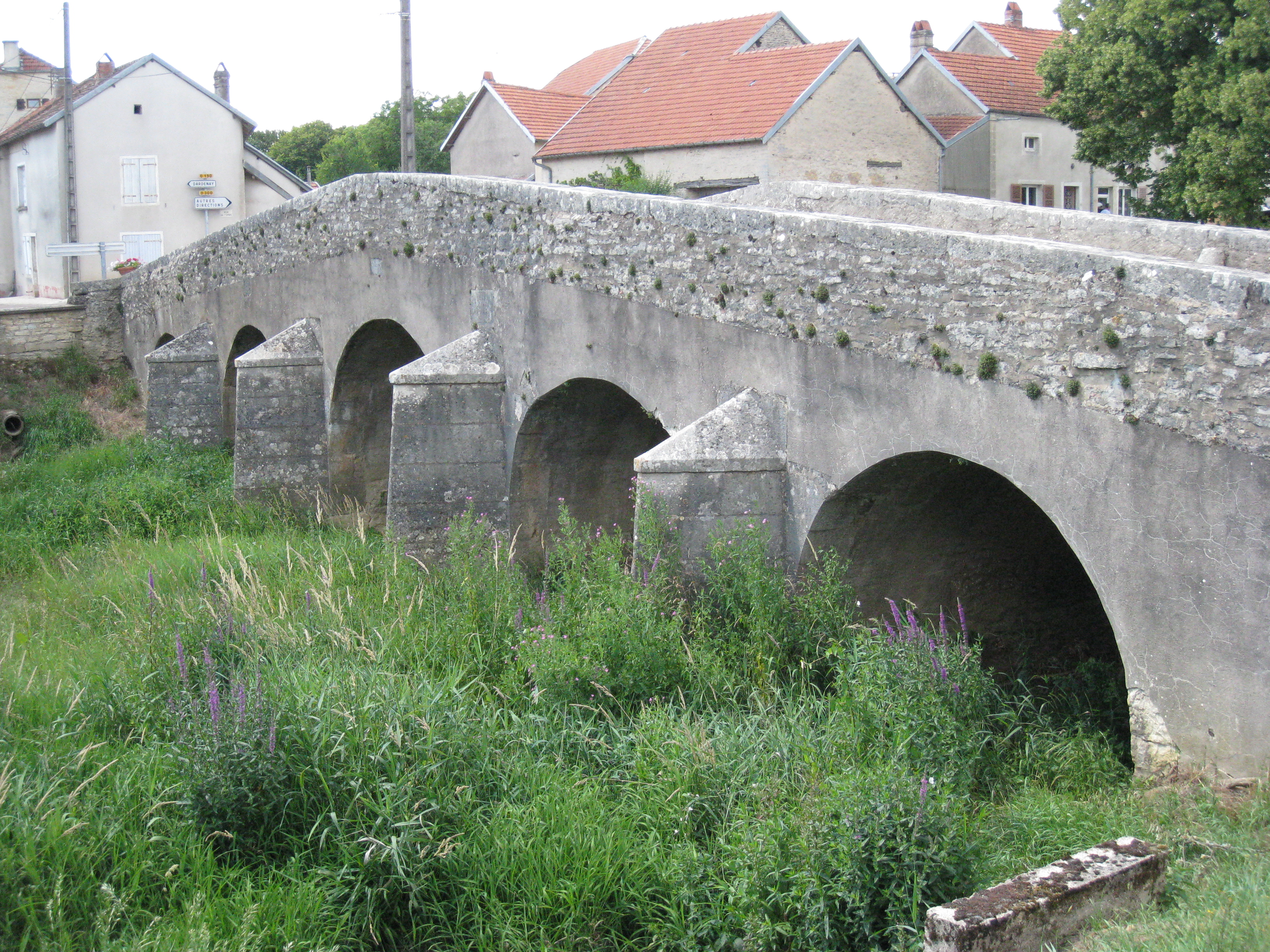 Pont sur la Vingeanne à Choilley